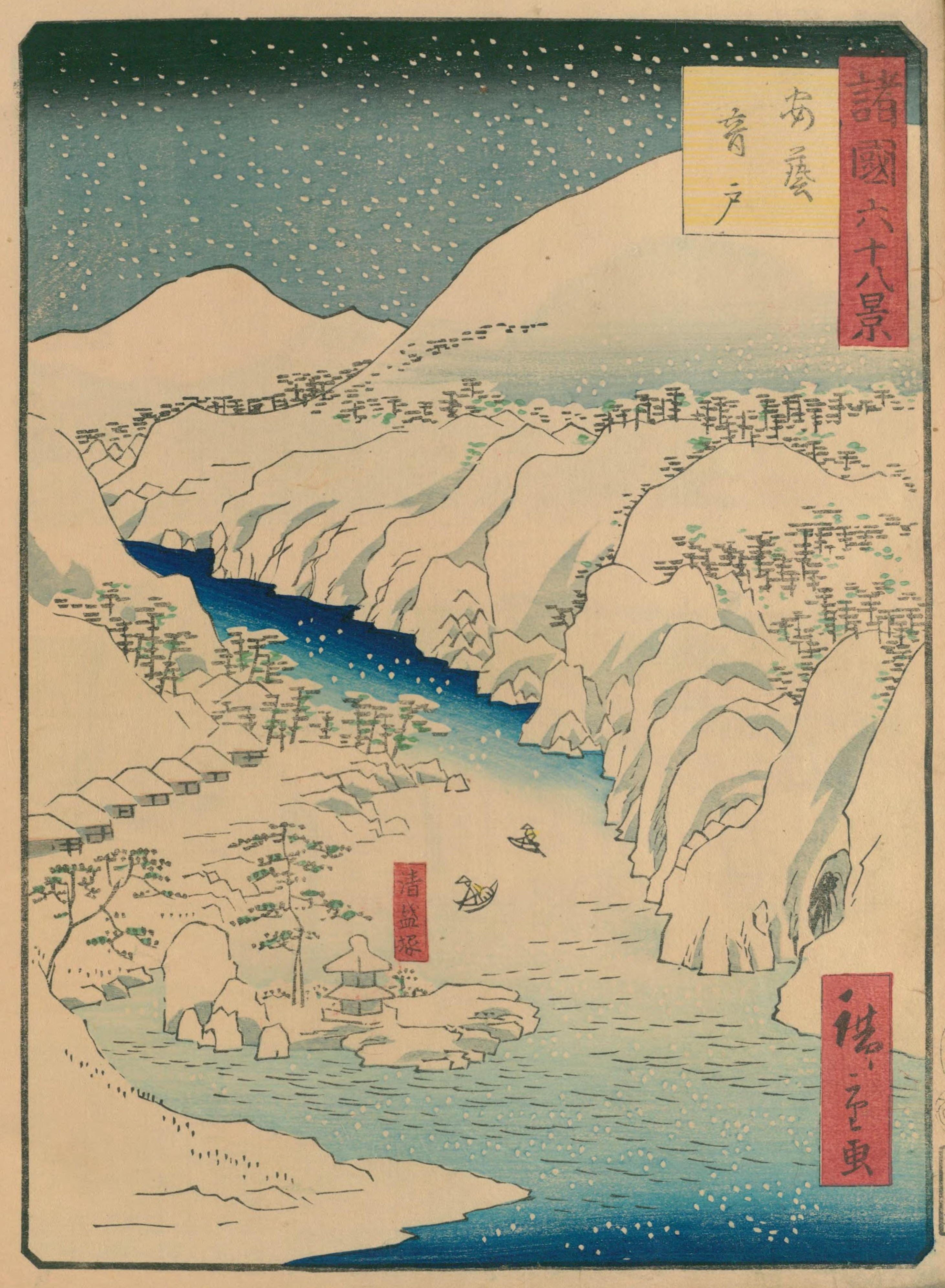 二代目廣重「諸国六十八景 安芸音戸」